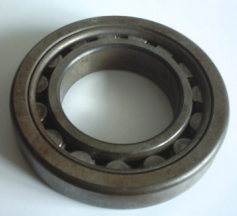 Lager - eigen werk - PD